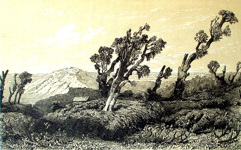 Vulkan Gede